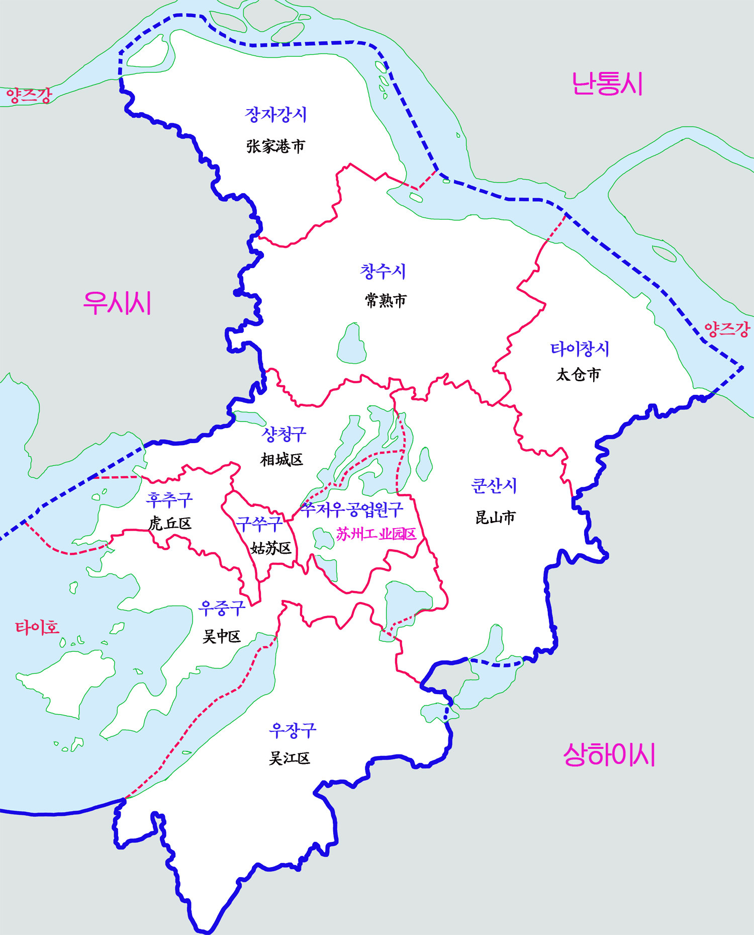 장쑤성 쑤저우시 현급행정구역도